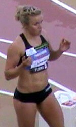 Elisa Leinonen Paavo Nurmen kisoissa, Paavo Nurmen stadionilla, Turussa, 16. kesäkuuta 2013